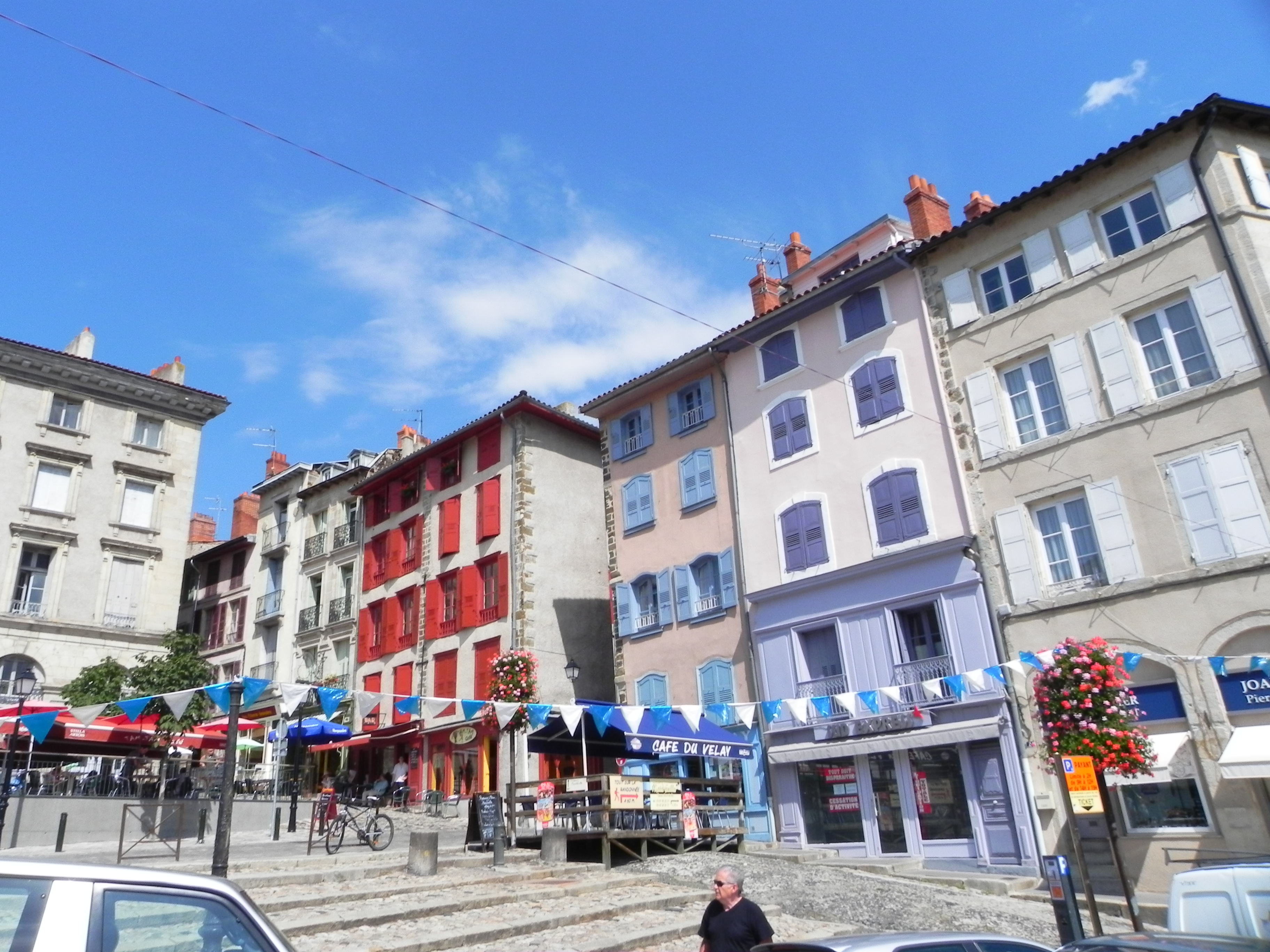 le Puy en Velay, situé au sud-est du Massif Central, point de départ de la « Via Podiensis » vers Saint-Jacques de Compostelle